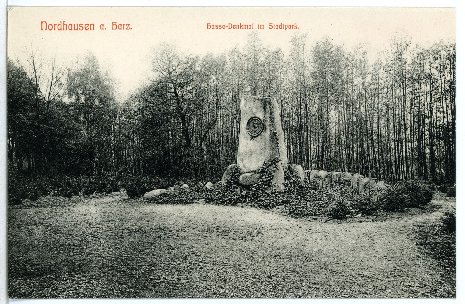 Nordhausen; Hassedenkmal im Stadtpark This postcard is from publisher Brück & Sohn in Meißen ( postcard has a unique number 09285 and is available in a higher resolution at the publisher. This images was uploaded in a cooperation project between Wikipedians and the publisher.